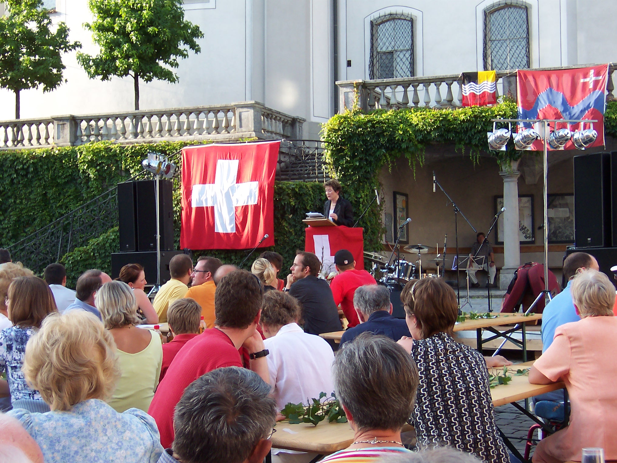 1.August-Rede von Elisabeth Kopp, Schwyz (SZ), 2007